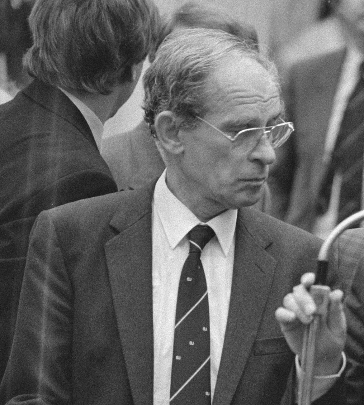 Collectie / Archief : Fotocollectie Anefo Reportage / Serie : [ onbekend ] Beschrijving : Tweede Kamer : debat kernongeval Tsjernobyl; vlnr: Nijpel VVD woordvoerder Braams , CDA woordvoerder Lansink , de Vries Datum : 7 mei 1986 Trefwoorden : debatten Persoonsnaam : Cda Woordvoerder Lansink Fotograaf : Bogaerts, Rob / Anefo Auteursrechthebbende : Nationaal Archief Materiaalsoort : Negatief (zwart/wit) Nummer archiefinventaris : bekijk toegang 2.24.01.05 Bestanddeelnummer : 933-6497